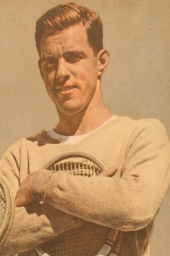 Andrés Hammersley (Chile) y Don Mc Neill (Estados Unidos).